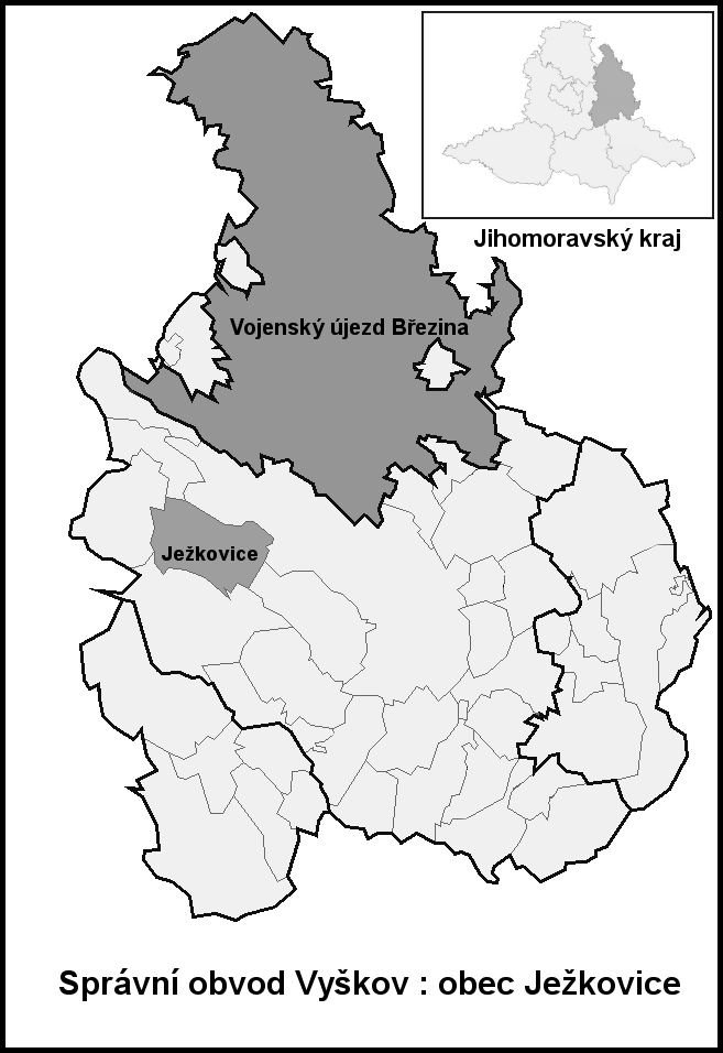 Hranice Ježkovice (Vyškov- Czech republic)